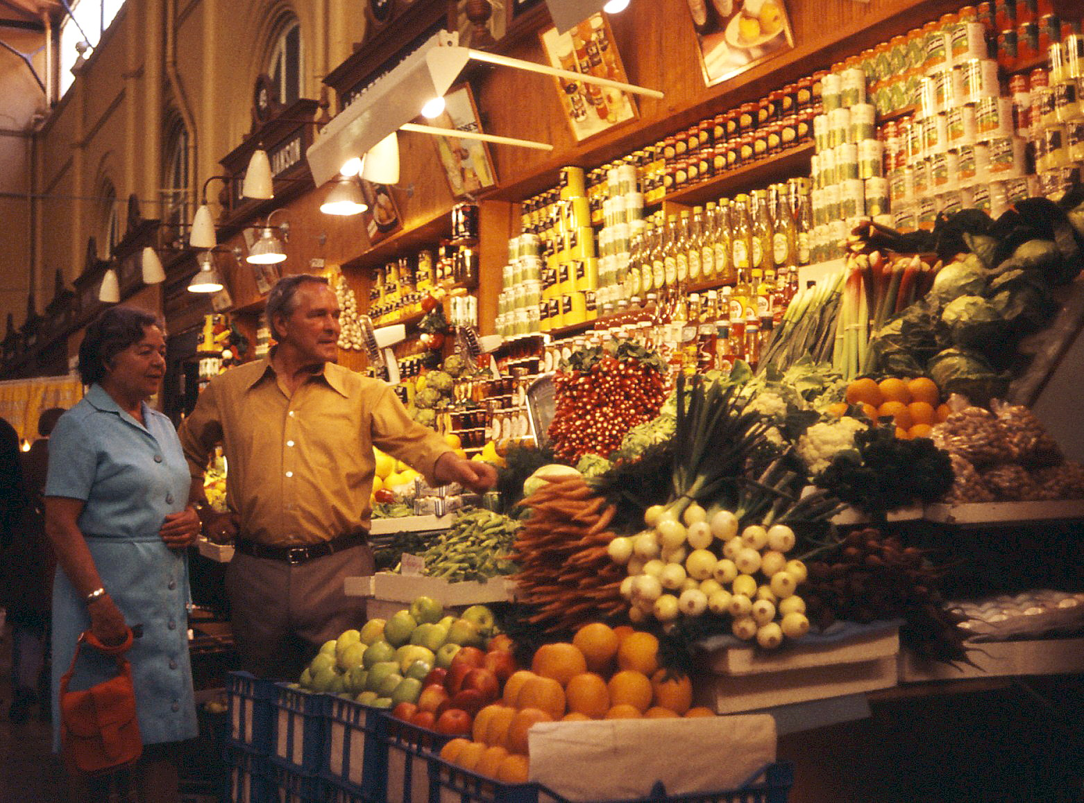 Östermalms Saluhall 1975